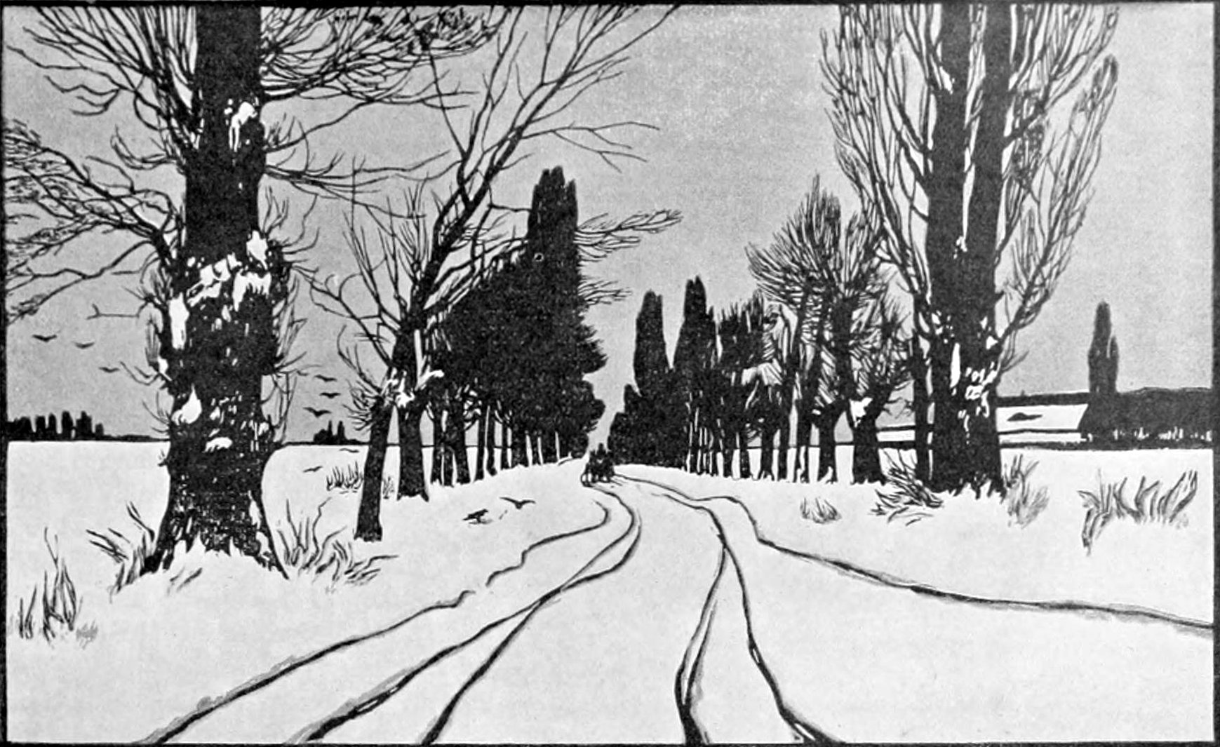 Une route enneigée